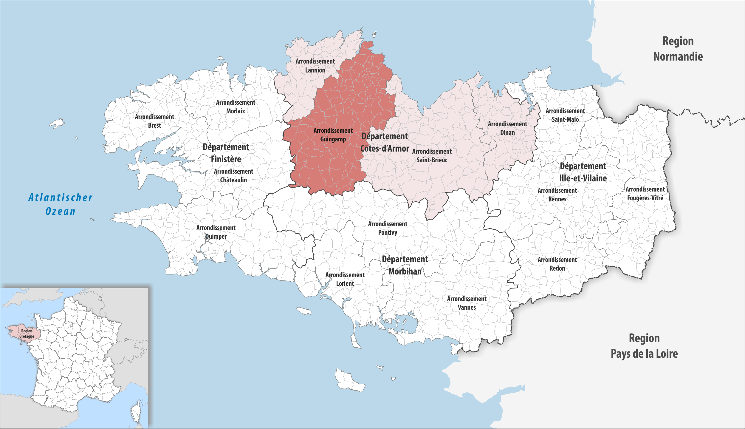 Lage des Arrondissements Guingamp